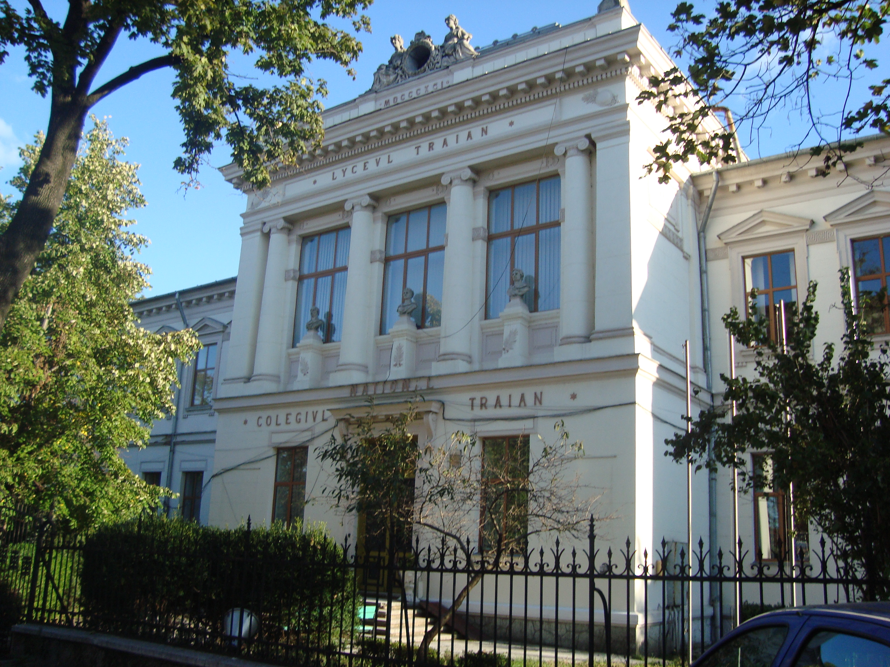 Liceul Traian, Bd. Carol I nr. 6 (vizavi de poliție), Drobeta-Turnu Severin